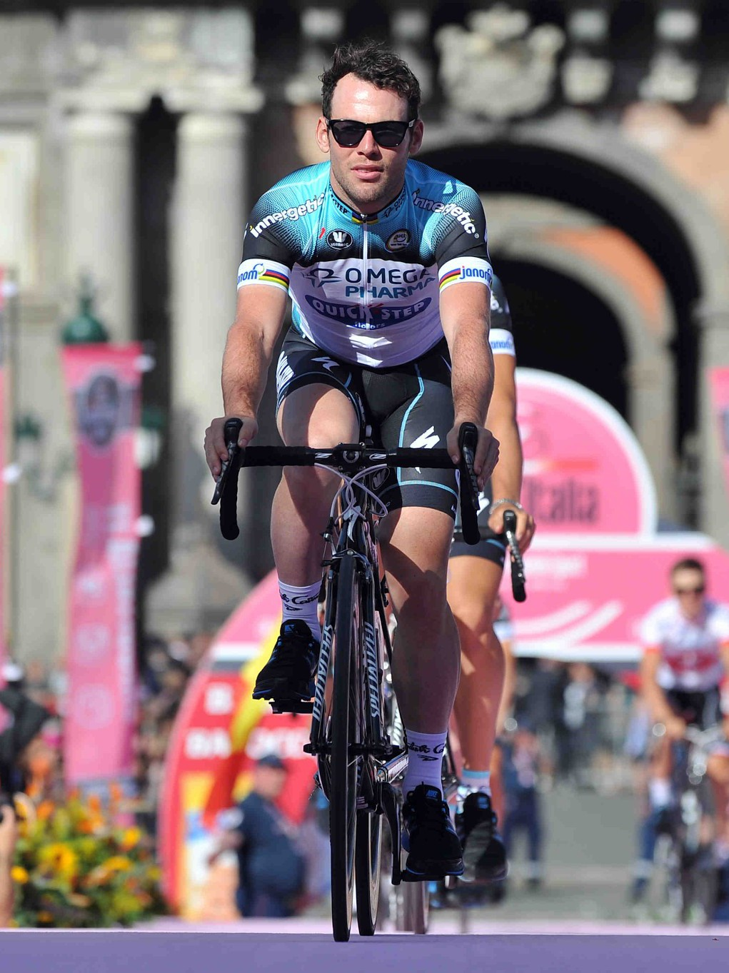 96mo Giro d'Italia, Presentación de equipos